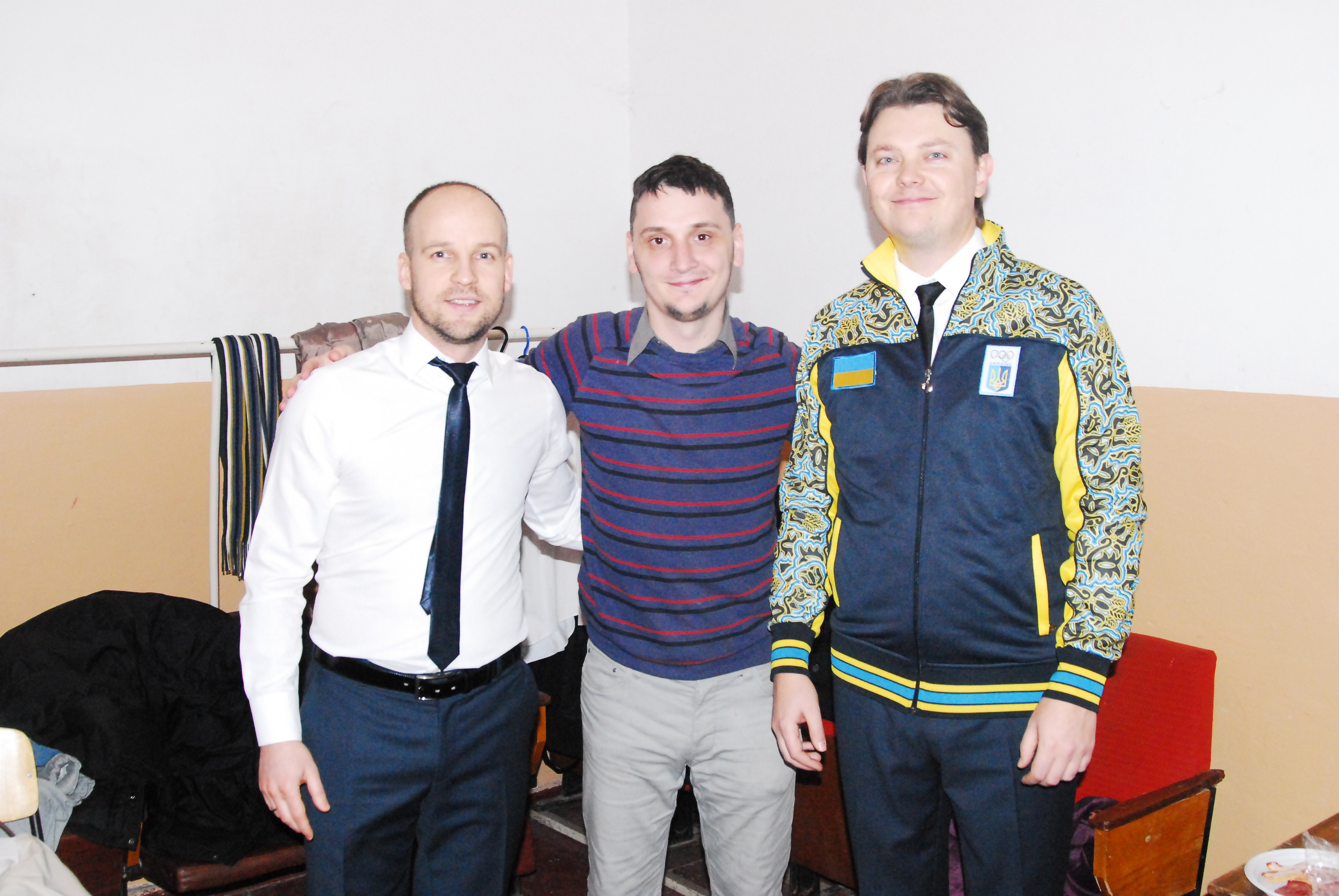 Братья Шумахеры (Юрий Великий и Сергей Цвиловский) В Мелитополе